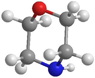 Структура морфоліну